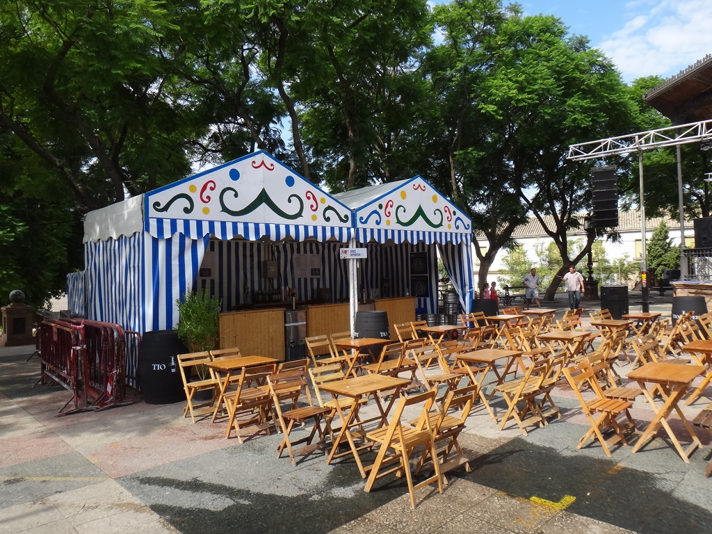 Fiestas de la Vendimia 2013 Jerez de la Frontera (Andalucía, España)